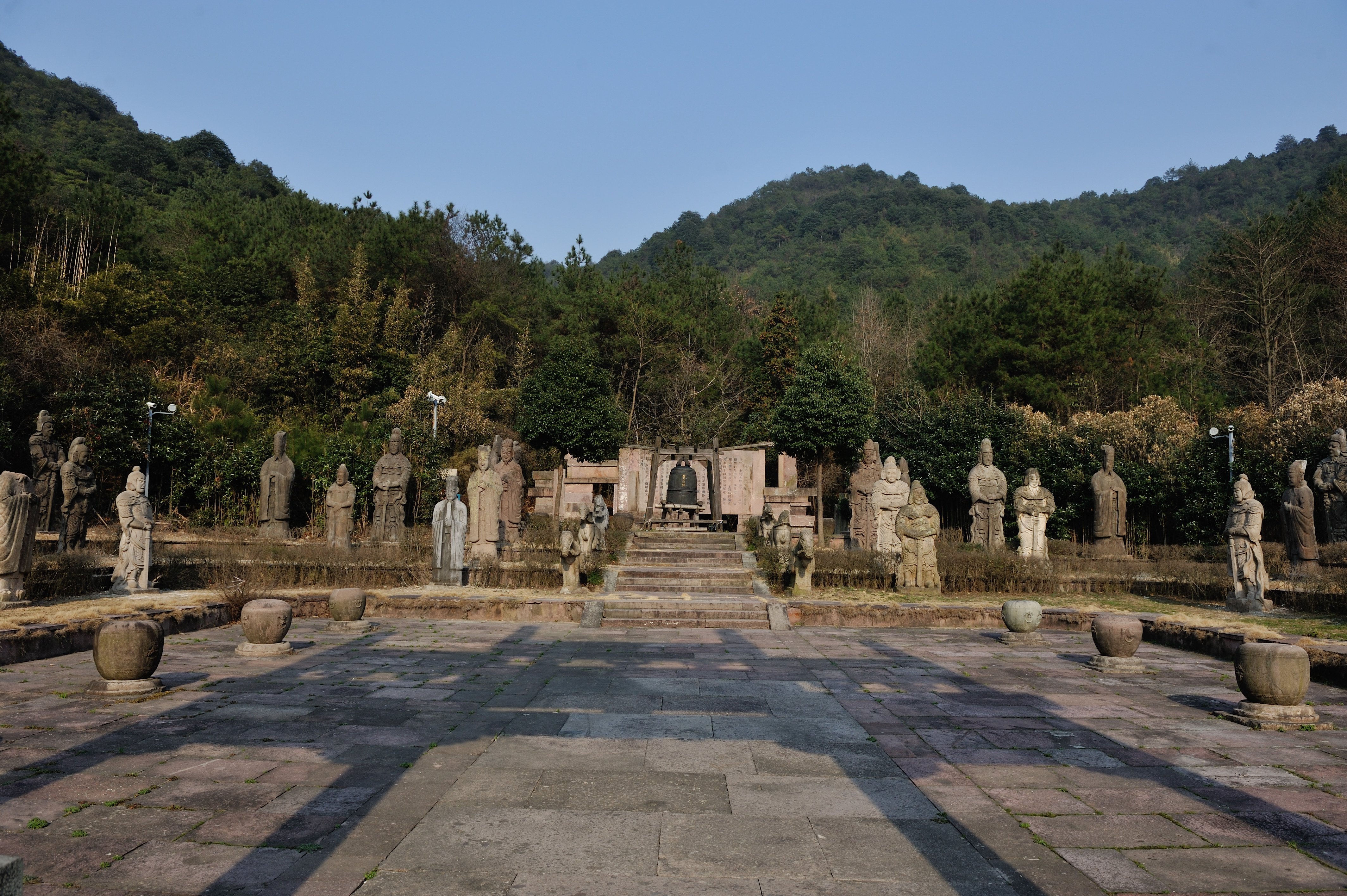 宁波南宋石刻公园